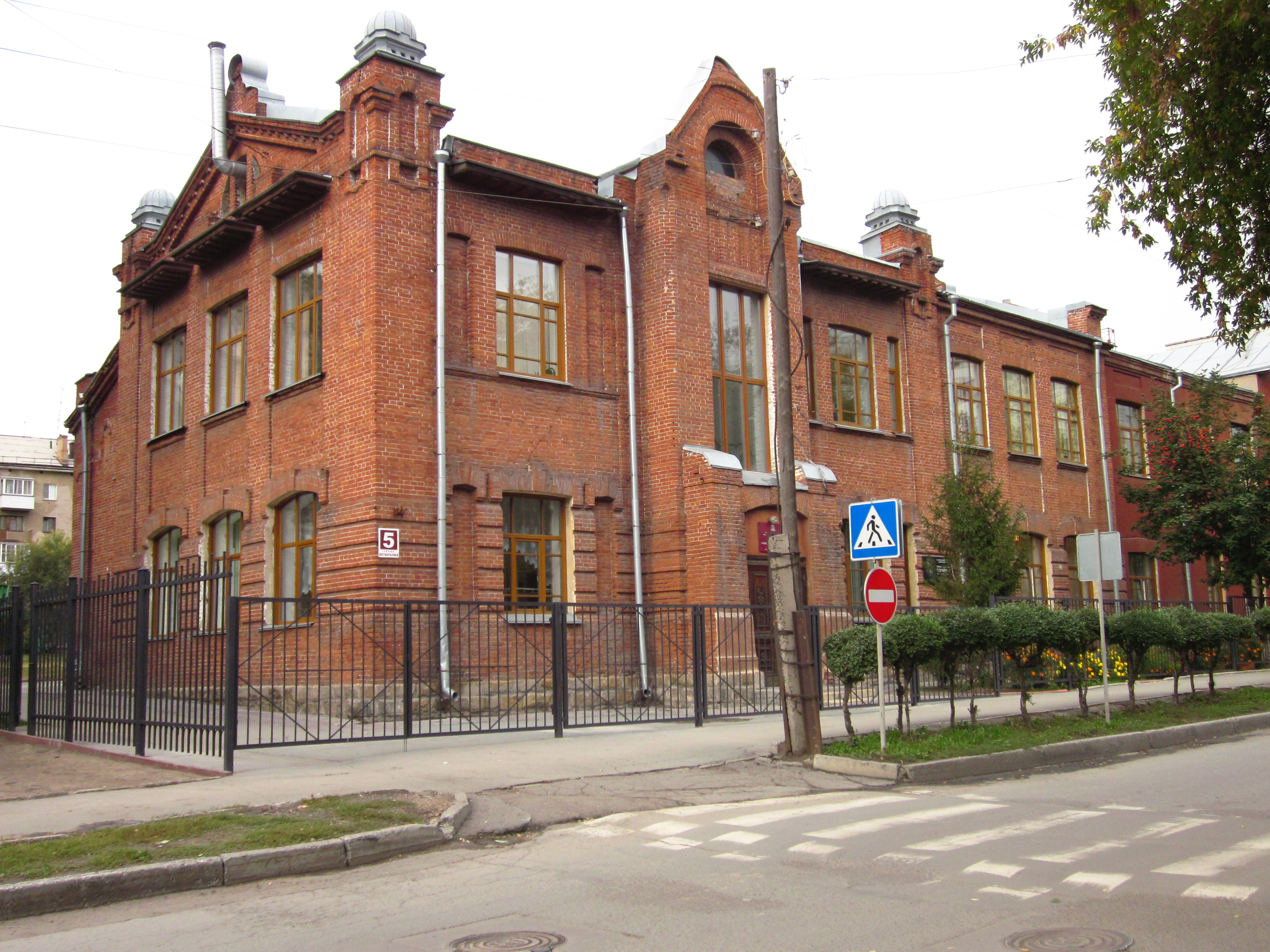 Школа на ул. Октябрьская, 5. Построена в 1912 г. Архитектор Крячков А.Д.